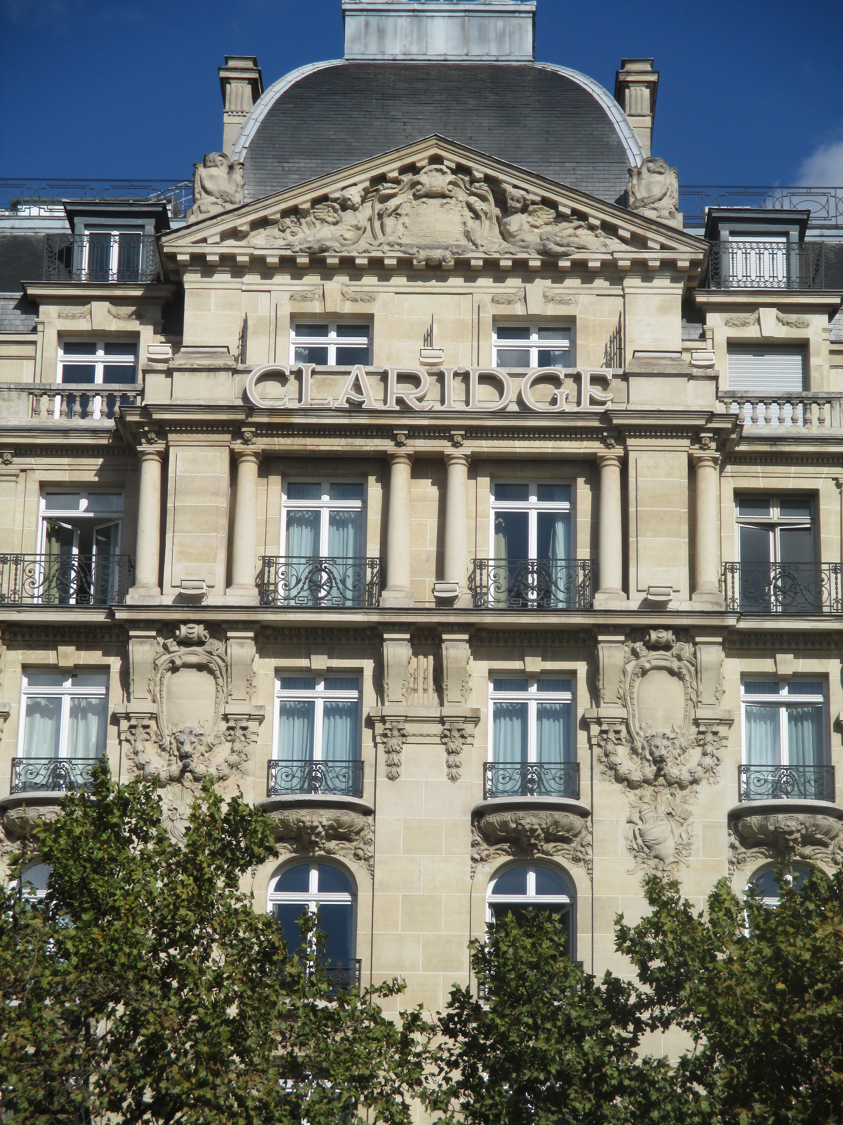 Hôtel Claridge aux Champs-Élysées.